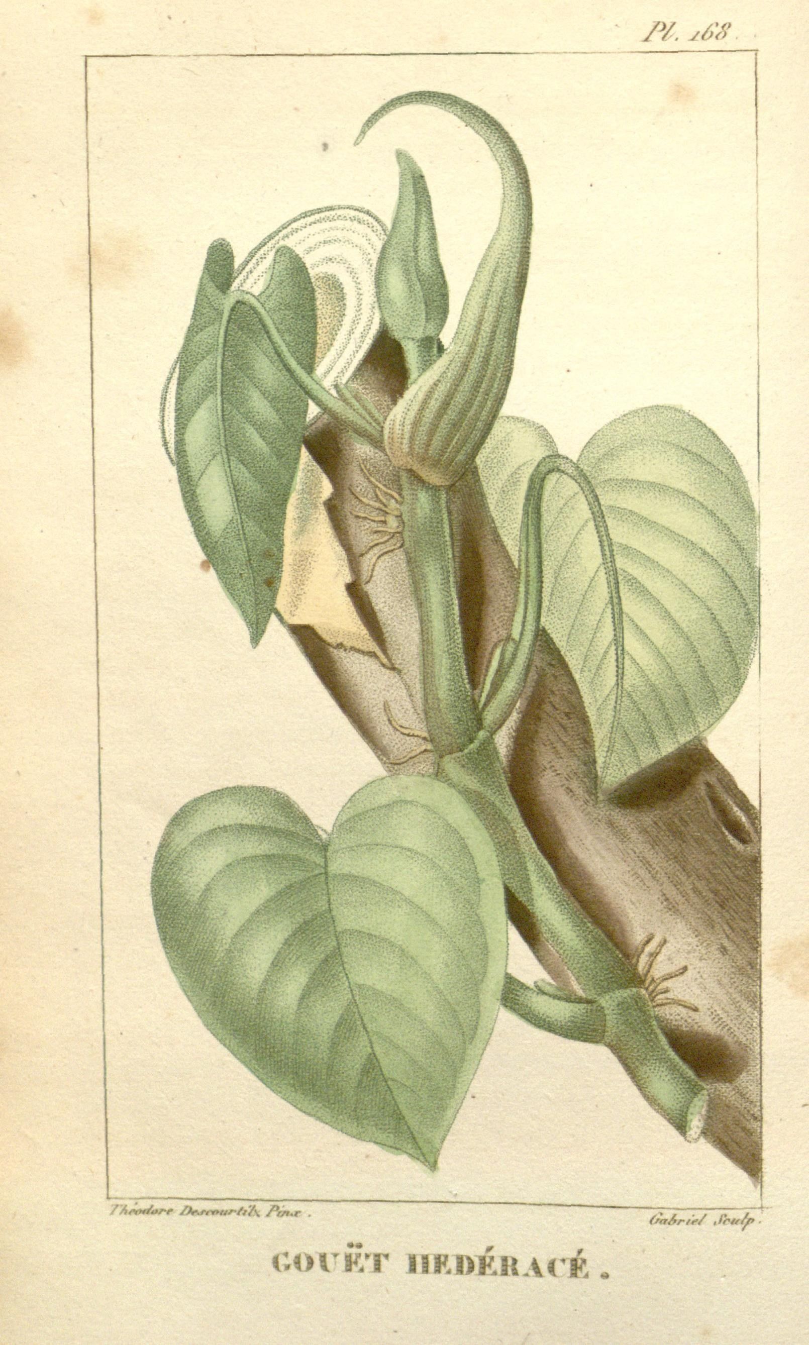 /y. y6'/.' //tfwùtr-r iOU.yT.w///A /*rn.r OaArtW Jhif/p COI KT IIR1.ÉRA. é